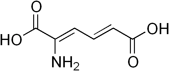 chemical structure of 2-aminomuconic acid